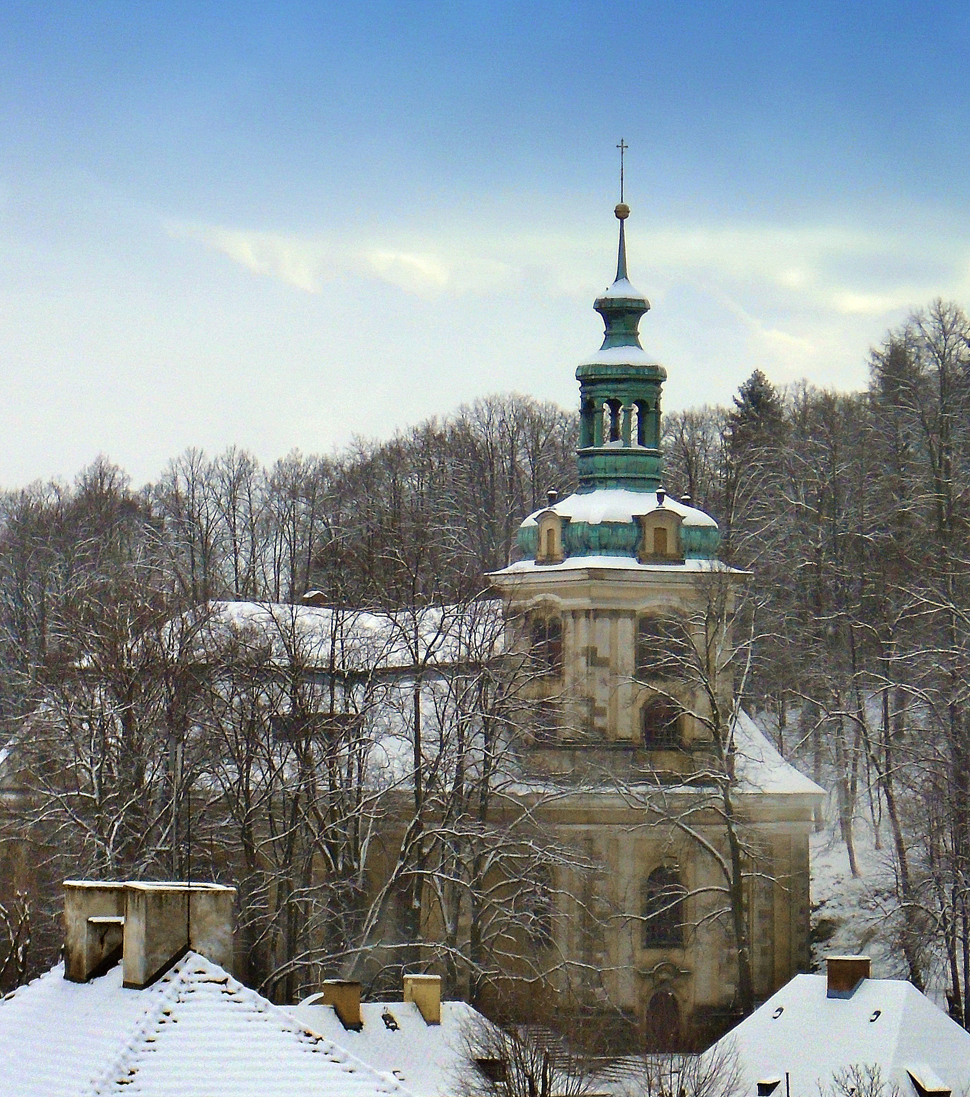 Kamienna Góra, kościół pw. Matki Bożej Rażańcowej